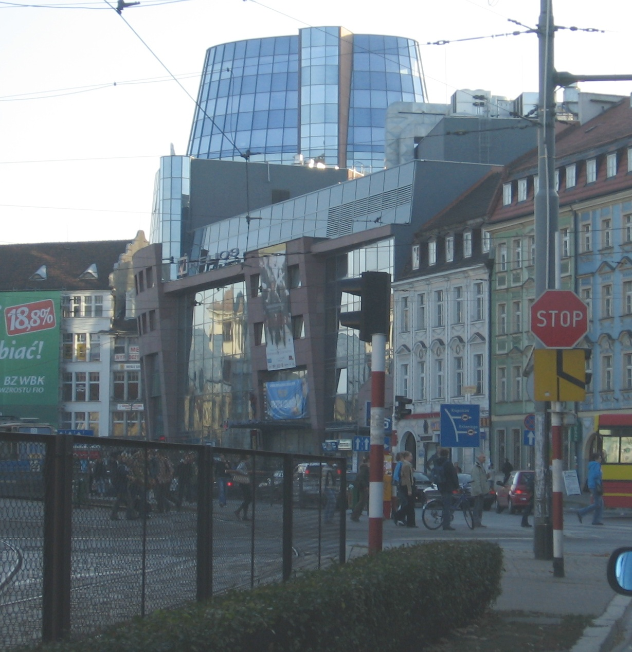 Wrocław, Poland Kazimierza Wielkiego street (near Ruska street crossing) - view at Wratislavia Tower